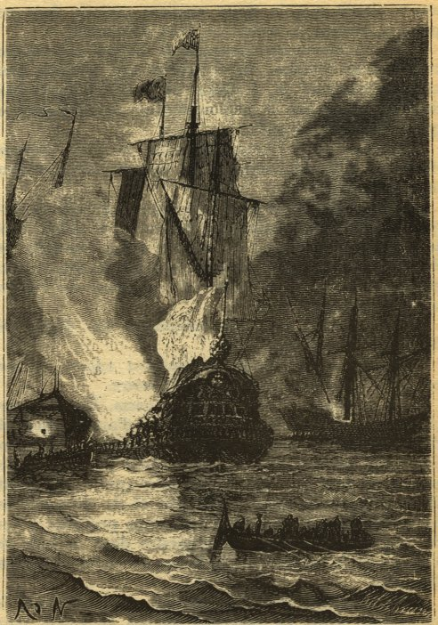 A ría de Vigo.